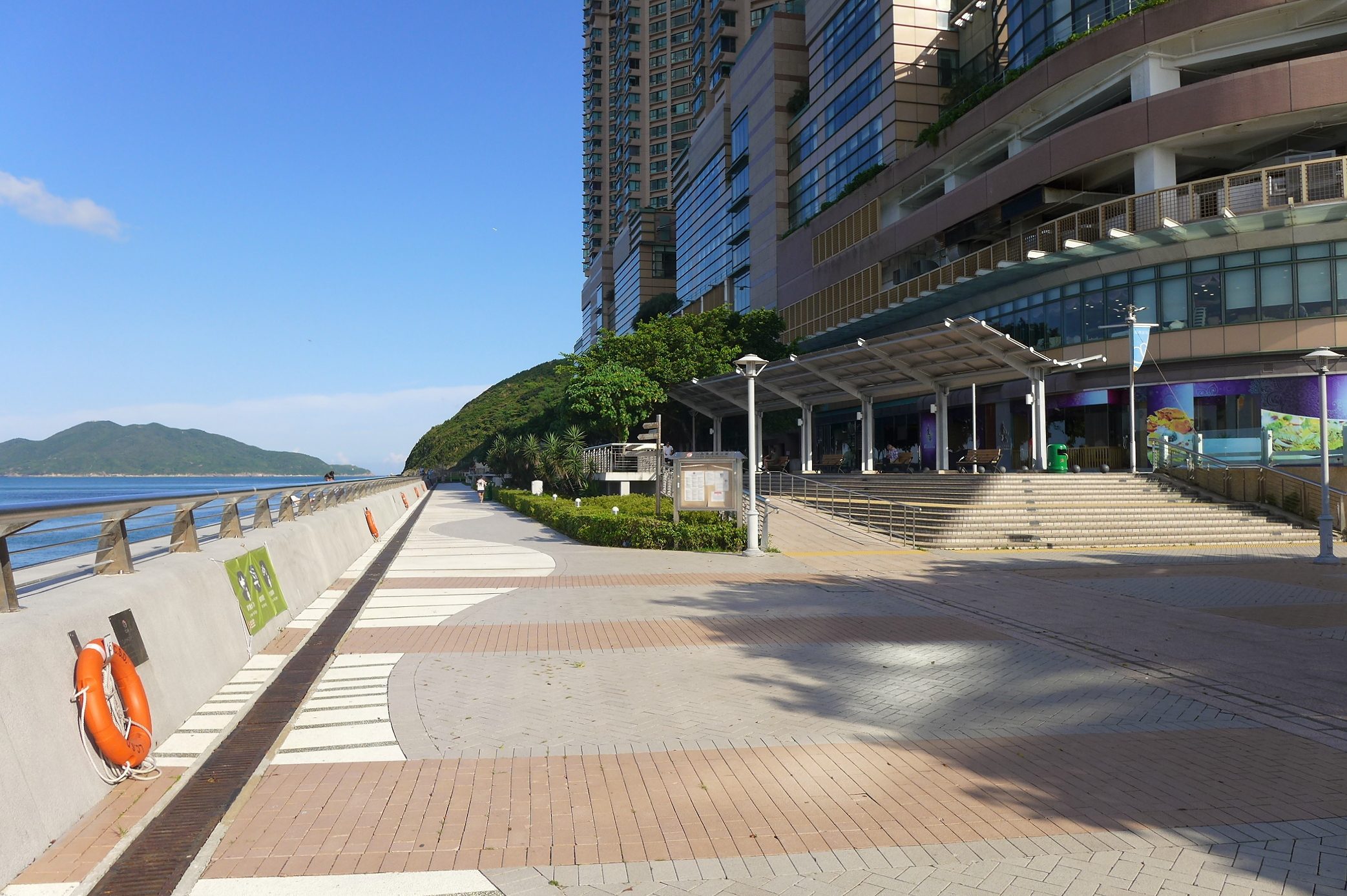 Siu Sai Wan Promenade